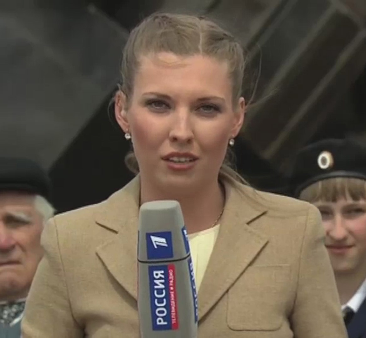 Прямая линия с Владимиром Путиным. Включение Ольги Скабеевой из Прохоровки.